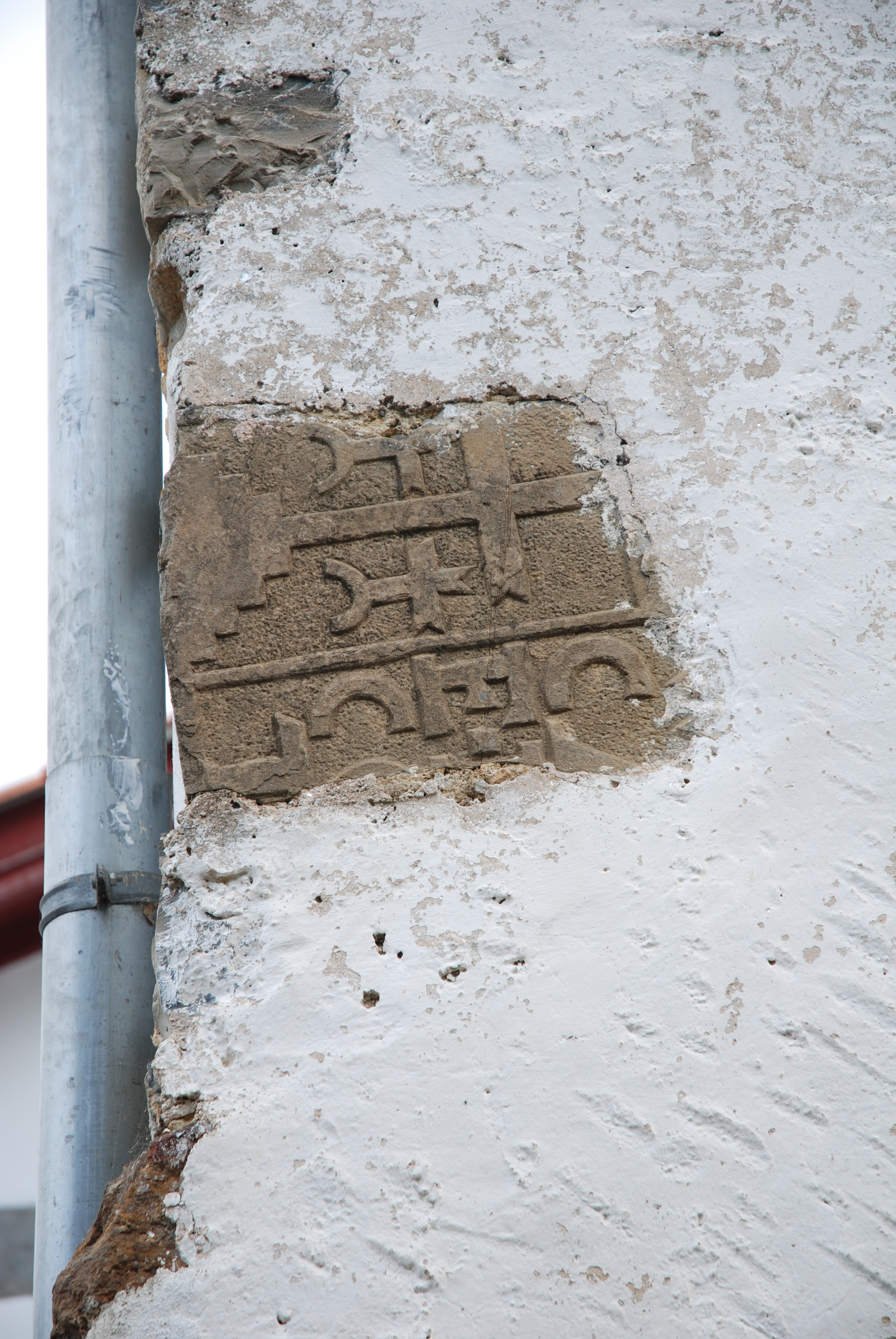 Iholdy, ancienne pierre tombale utilisée comme moëllon